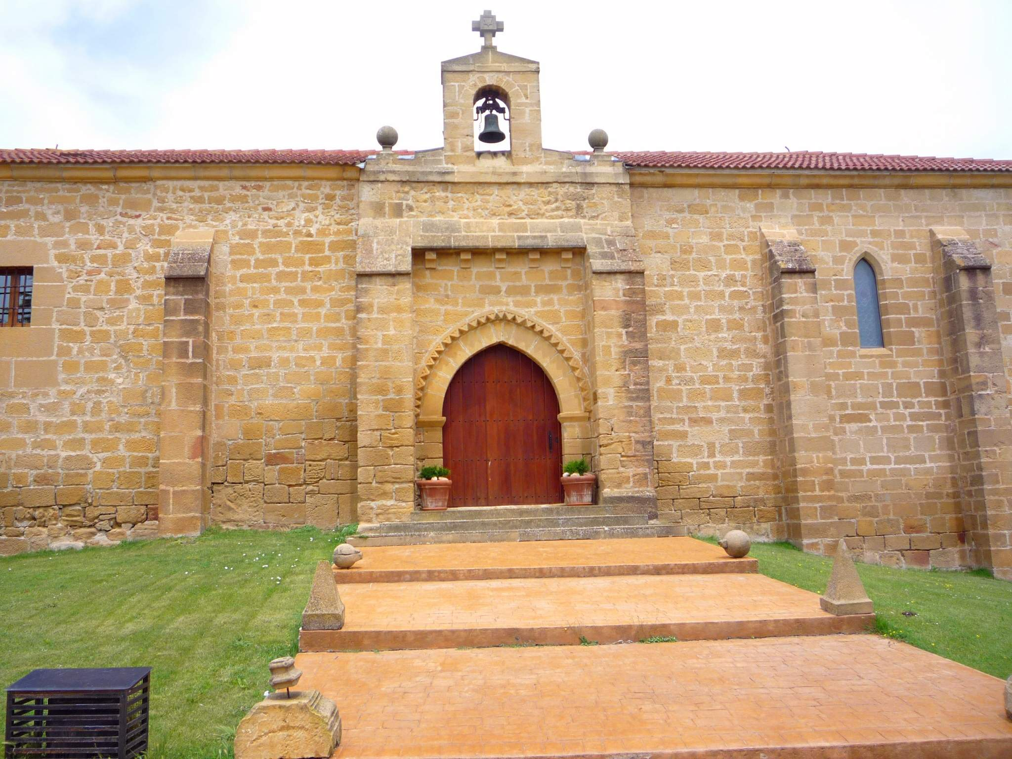 Ermita de San Torcuato (Villabuena, Álava)